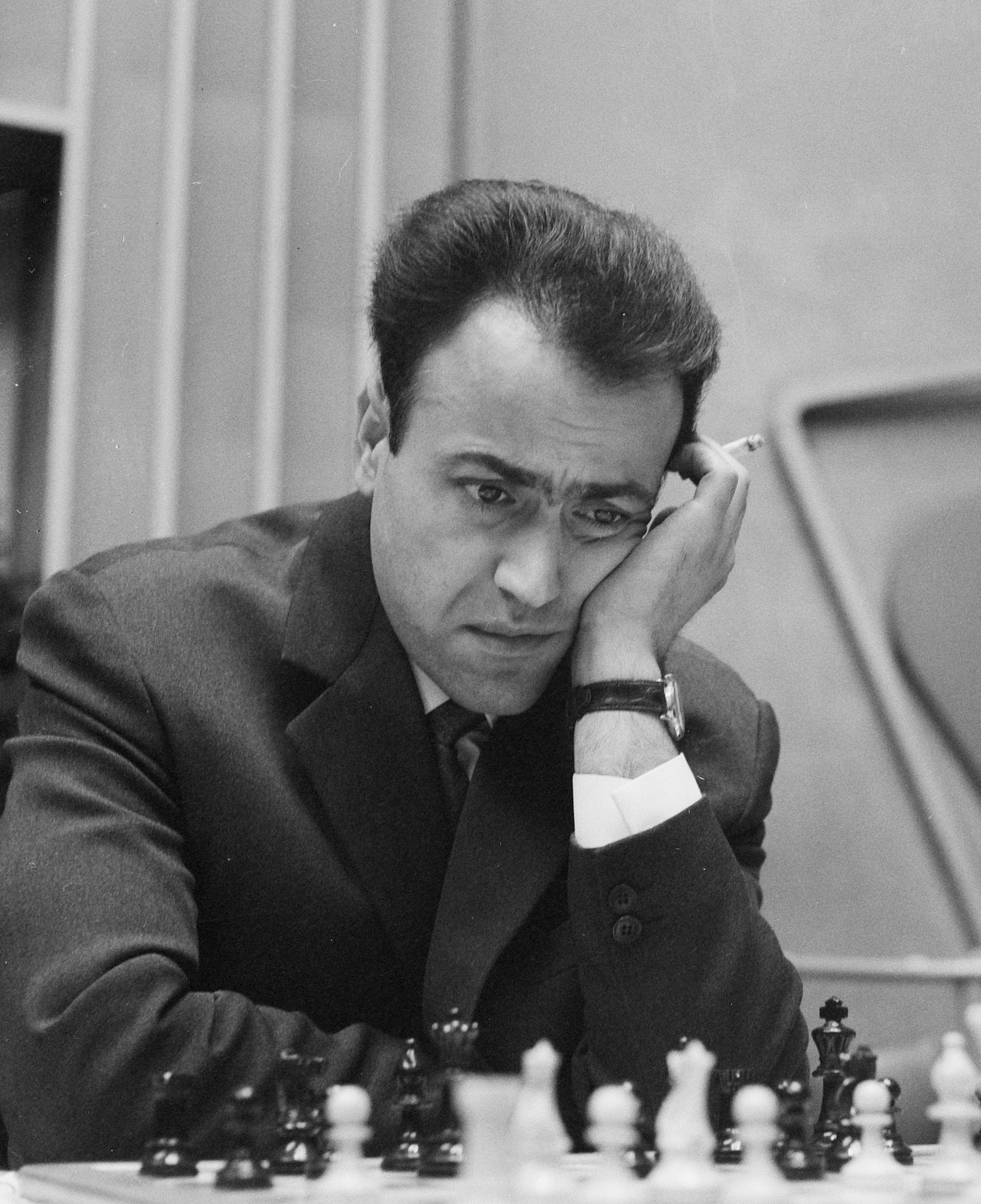 28e Hoogoven schaaktoernooi te Beverwijk, Bobotsov (Bulgarije)